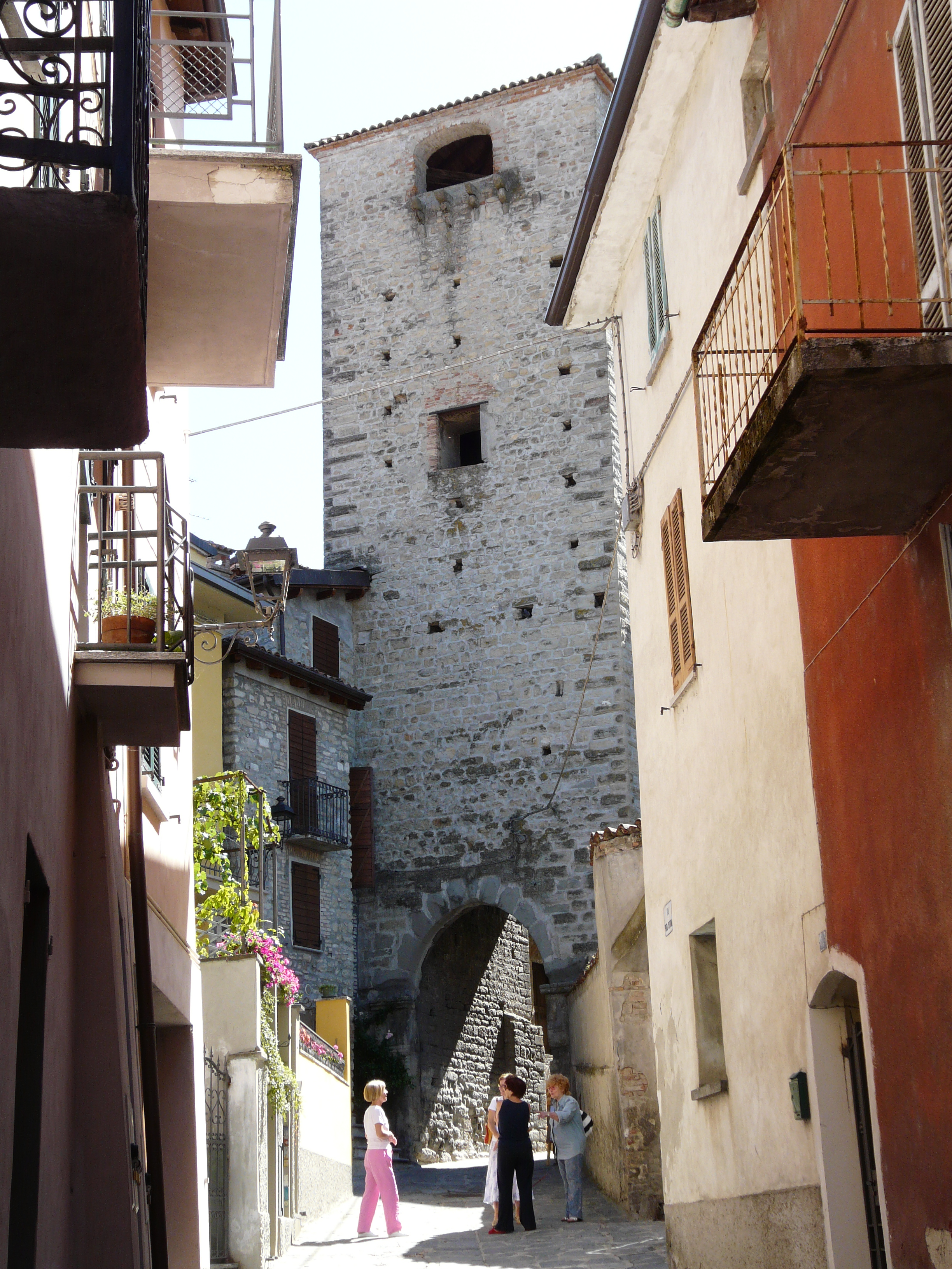 Torre di Porta Sottana, Varzi, Lombardia, Italia